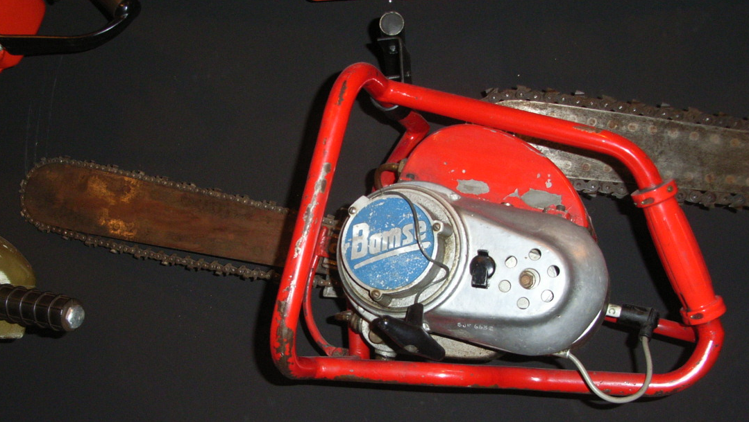 Bamse motorsag med råoljemotor, konstruert av Rasmus Wiig. Saga er utstilt på Norsk skogmuseum på Elverum.